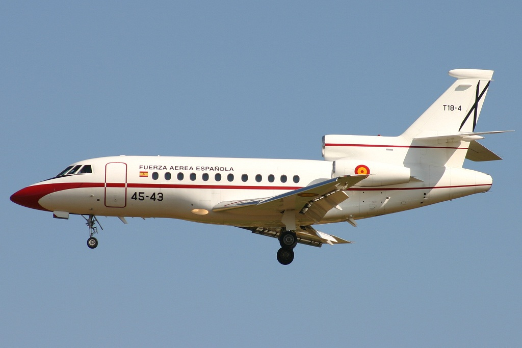 T18-4 / 45-43 (cn 74)